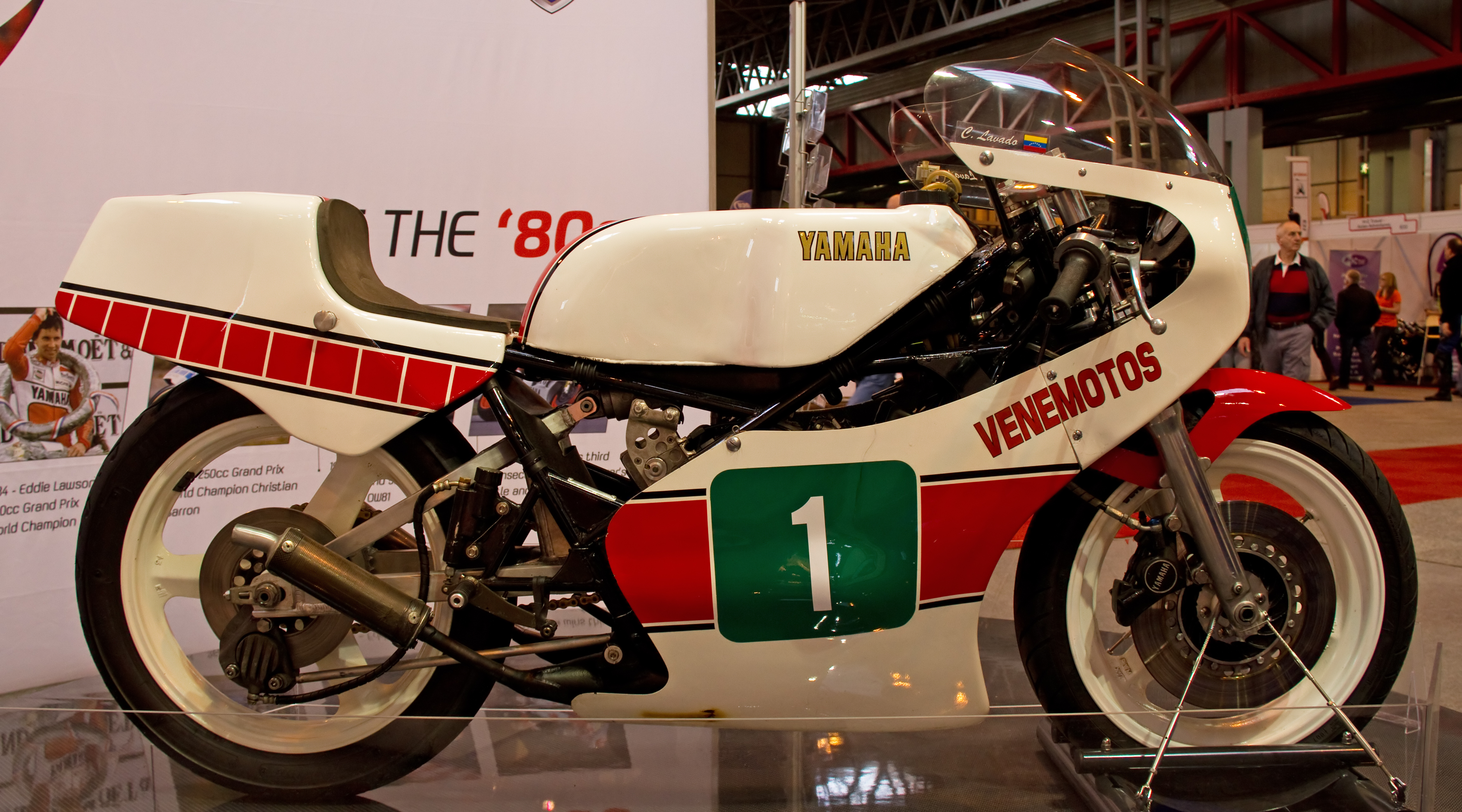 1983 Yamaha OW47 YZR250